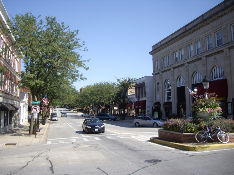 Glen Ellyn, IL